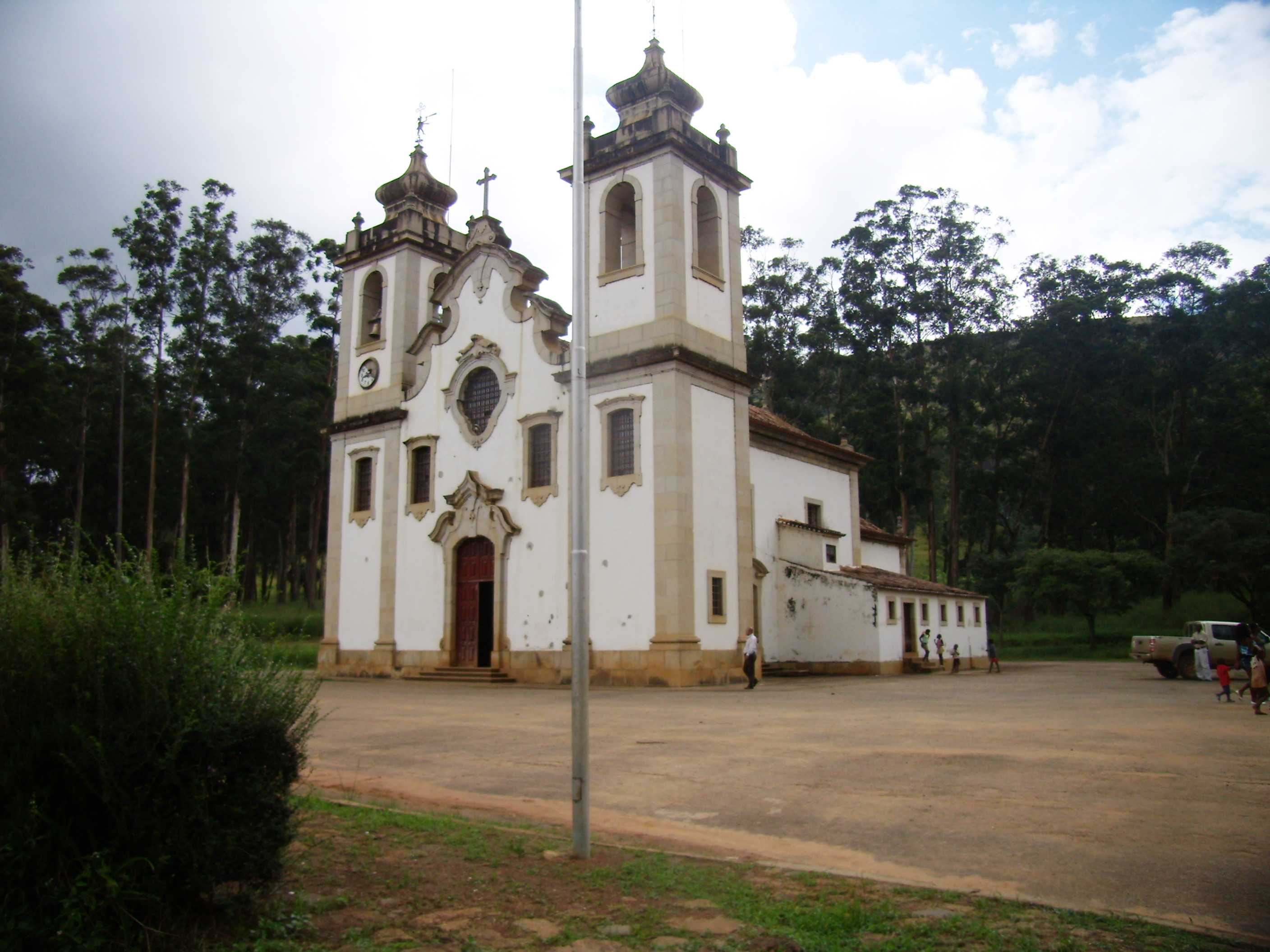 Igreja Matriz de Waku Kungo